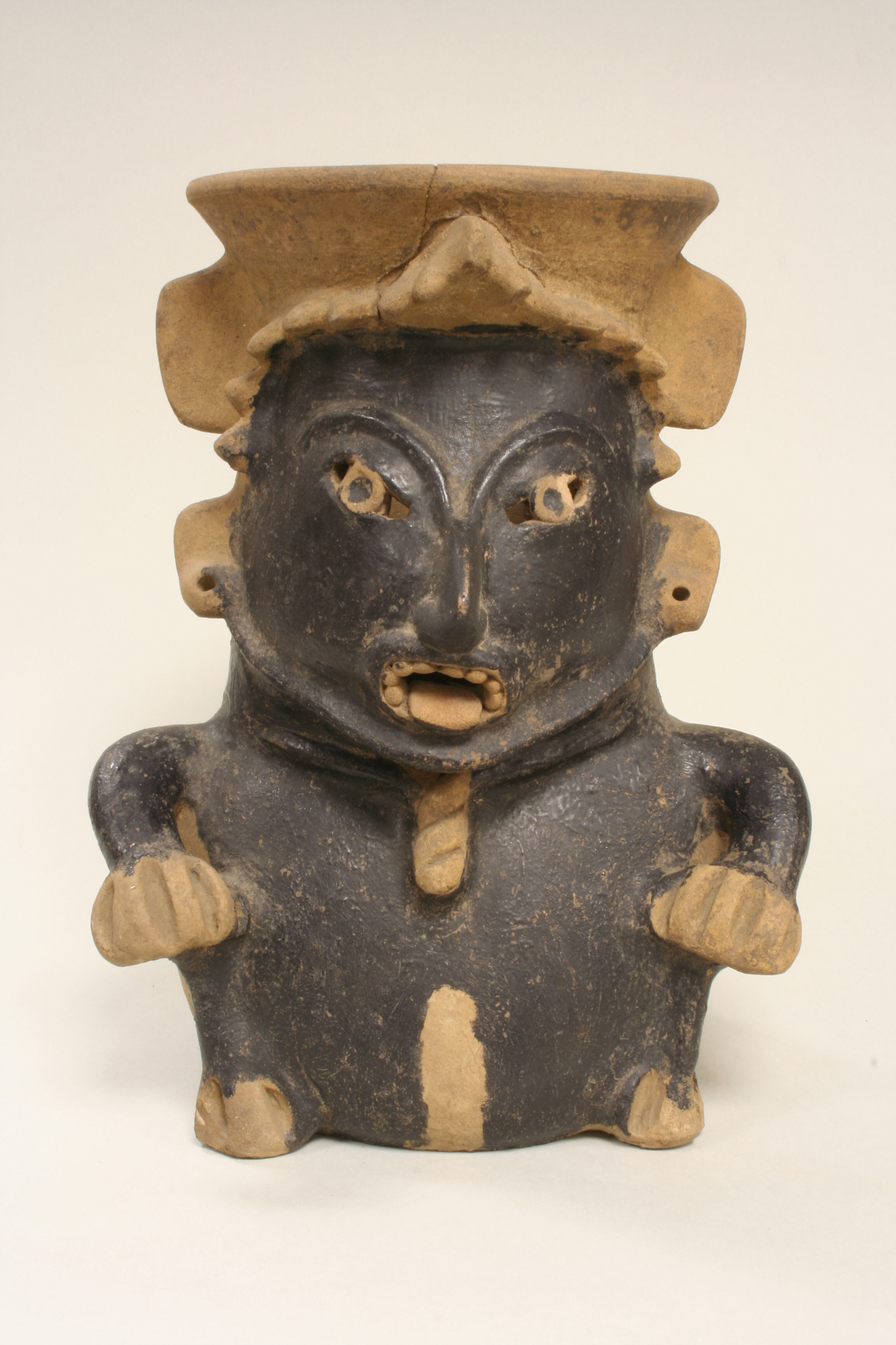 Remojadas; Vessel; Ceramics-Containers